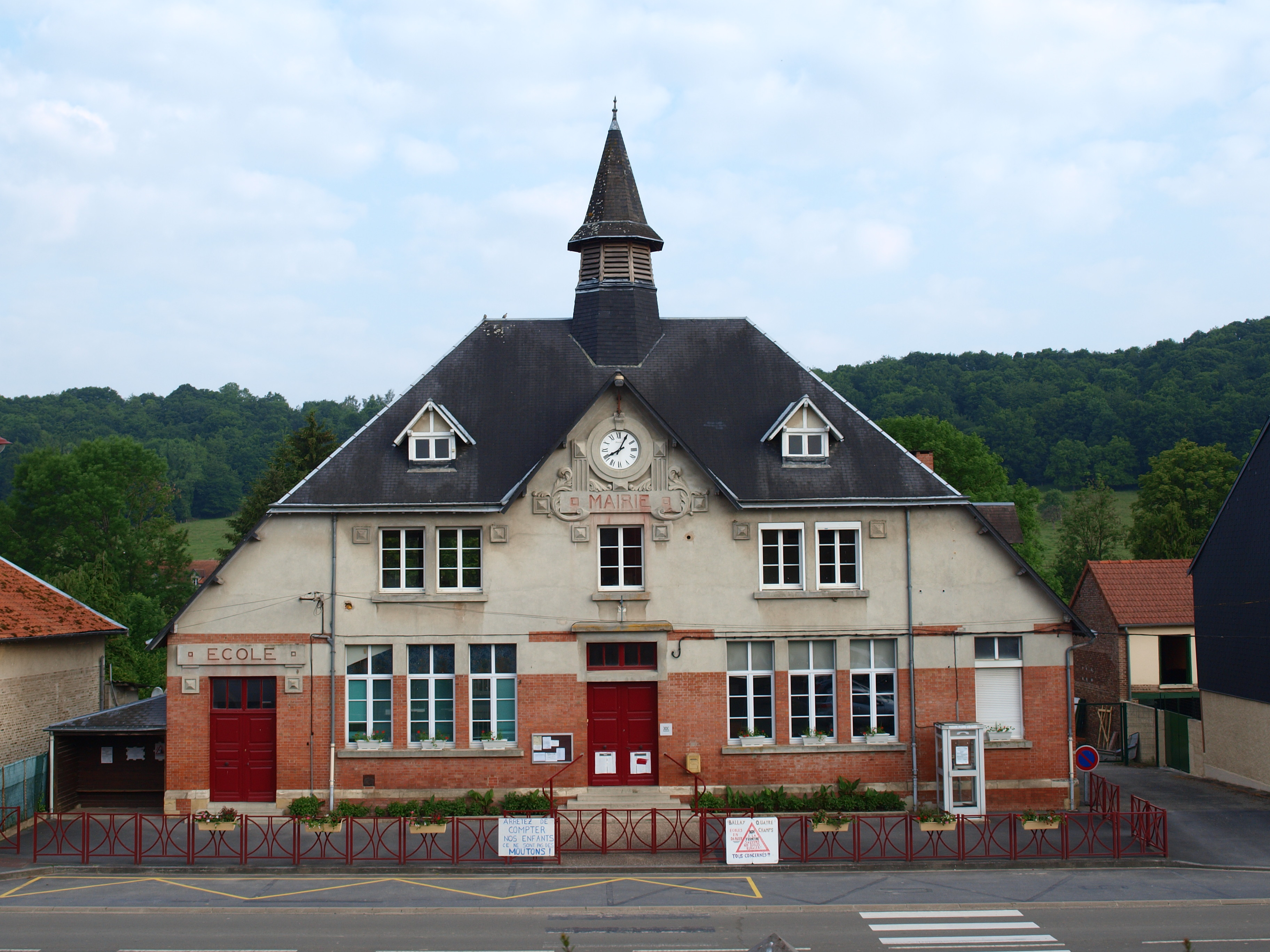 Ballay (Ardennes, France) ; mairie